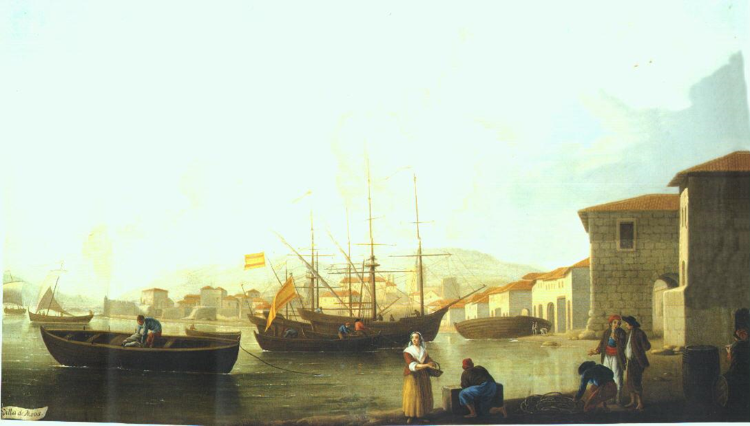 Vista de Muros por Mariano Ramón Sánchez. Cadro conservado no Palacio Real de Madrid